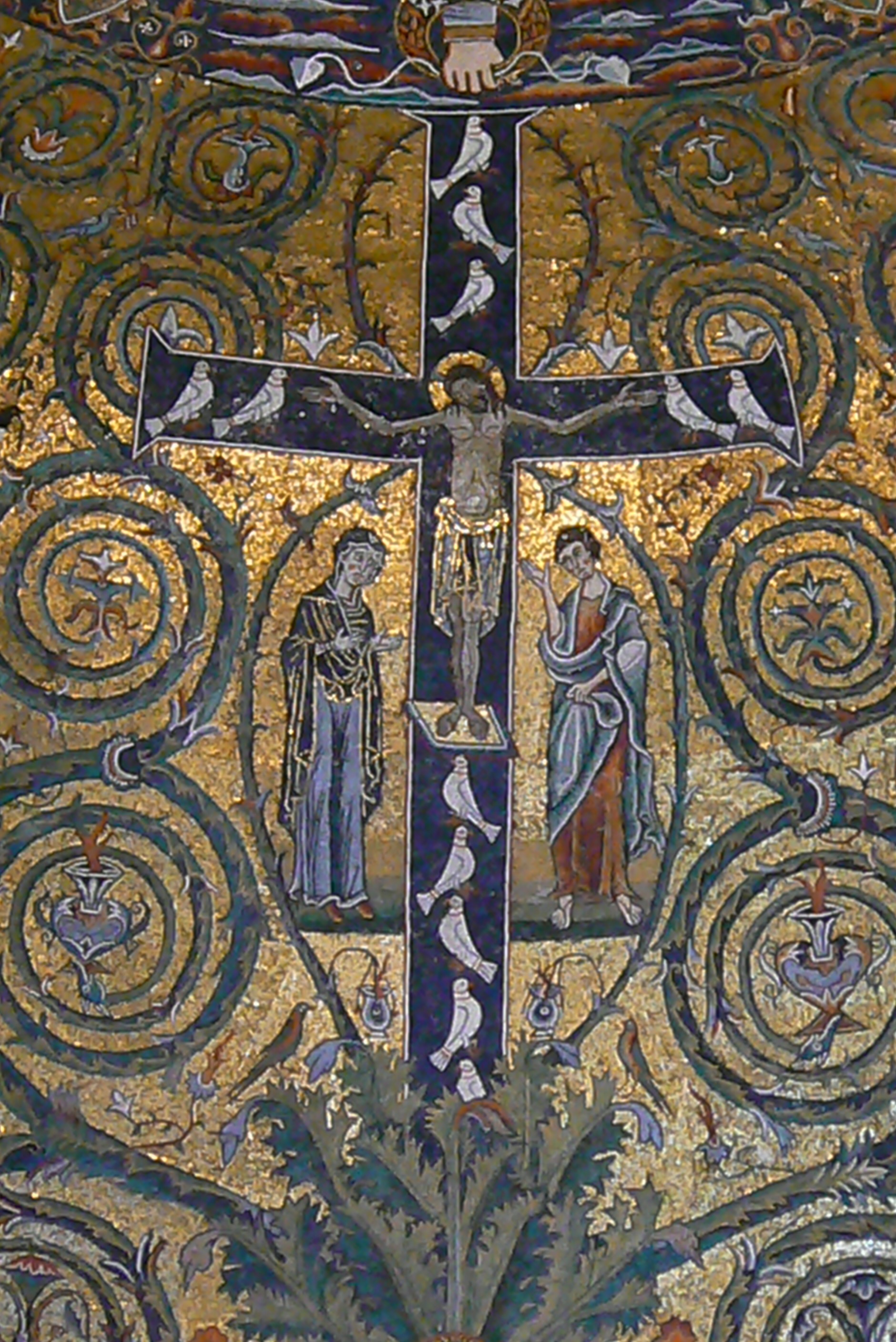 Roma, Basilica di San Clemente, mosaico, dettaglio